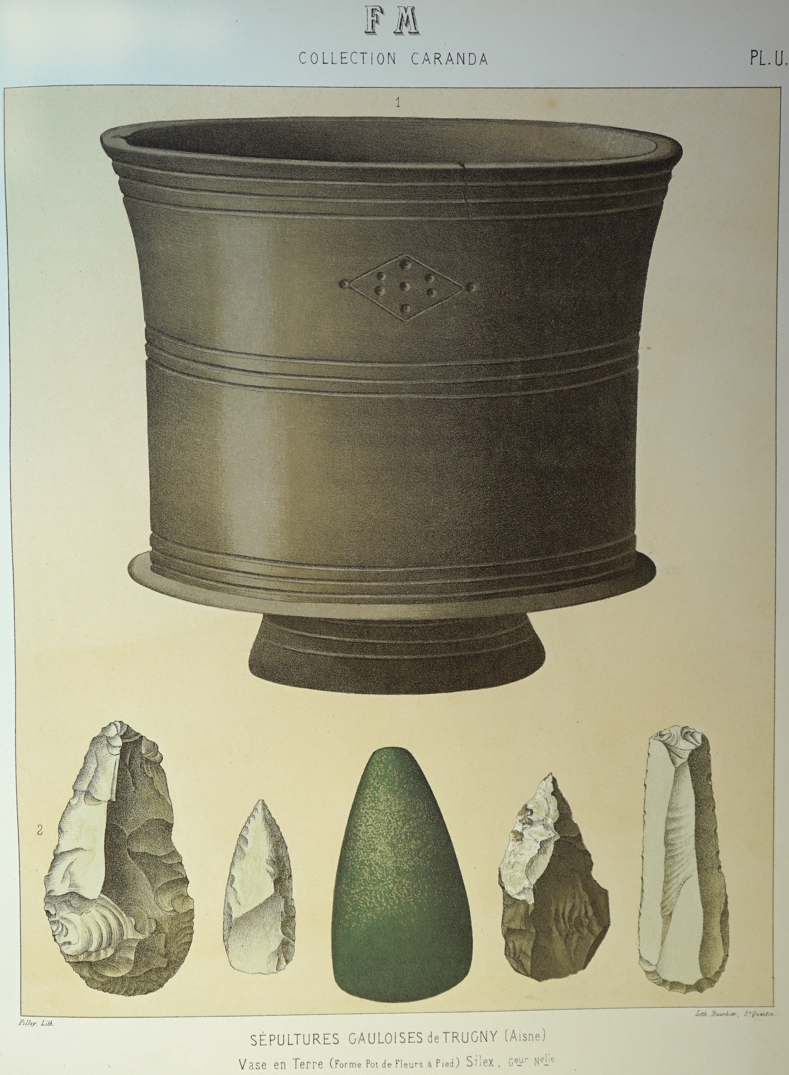 sur un dessin de Pilloy.